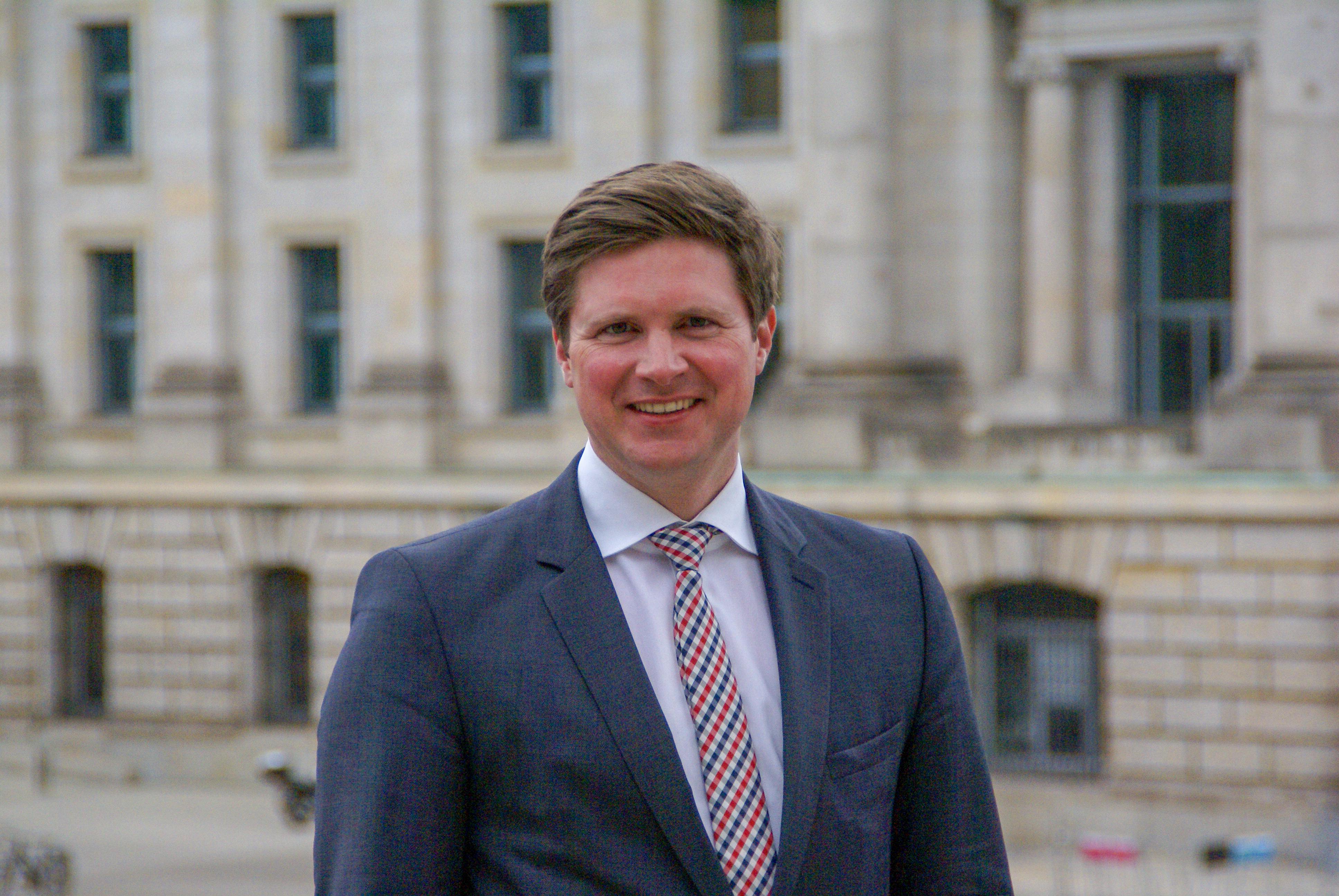 Dr. Florian Toncar, MdB, vor dem Reichstagsgebäude in Berlin